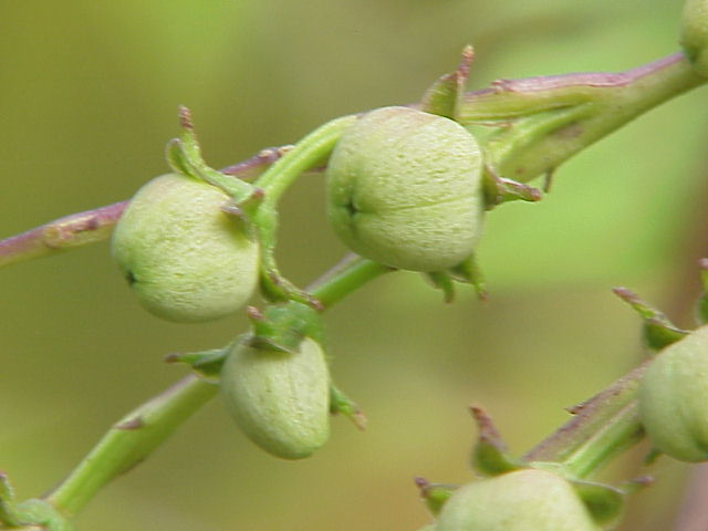 Species: Quamoclit lobata Ipomoea versicolor (syn. I. lobata, Mina lobata, Quamoclit lobata) Family: Convolvulaceae Image No. 1